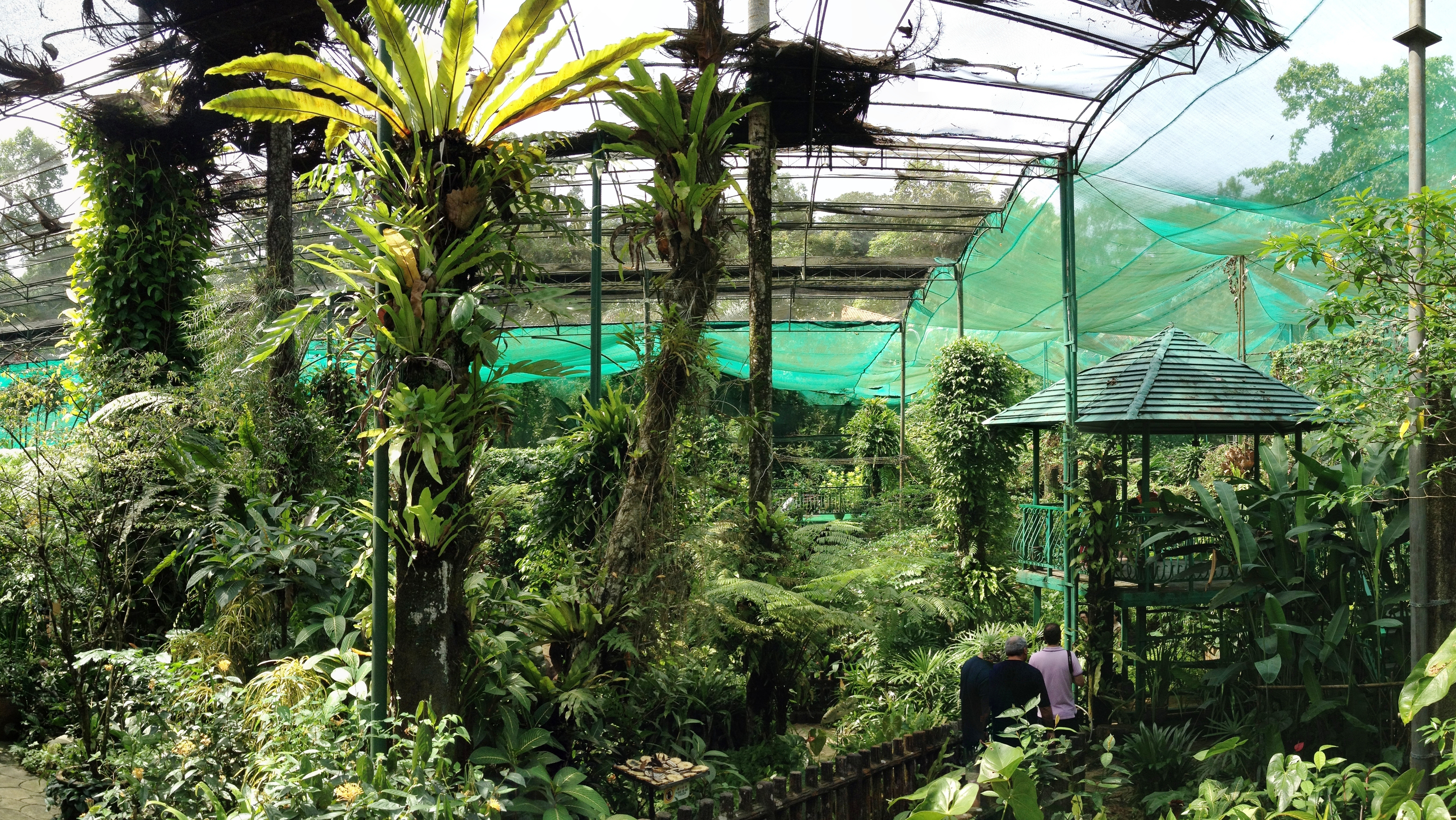 Kuala Lumpur Butterfly Park